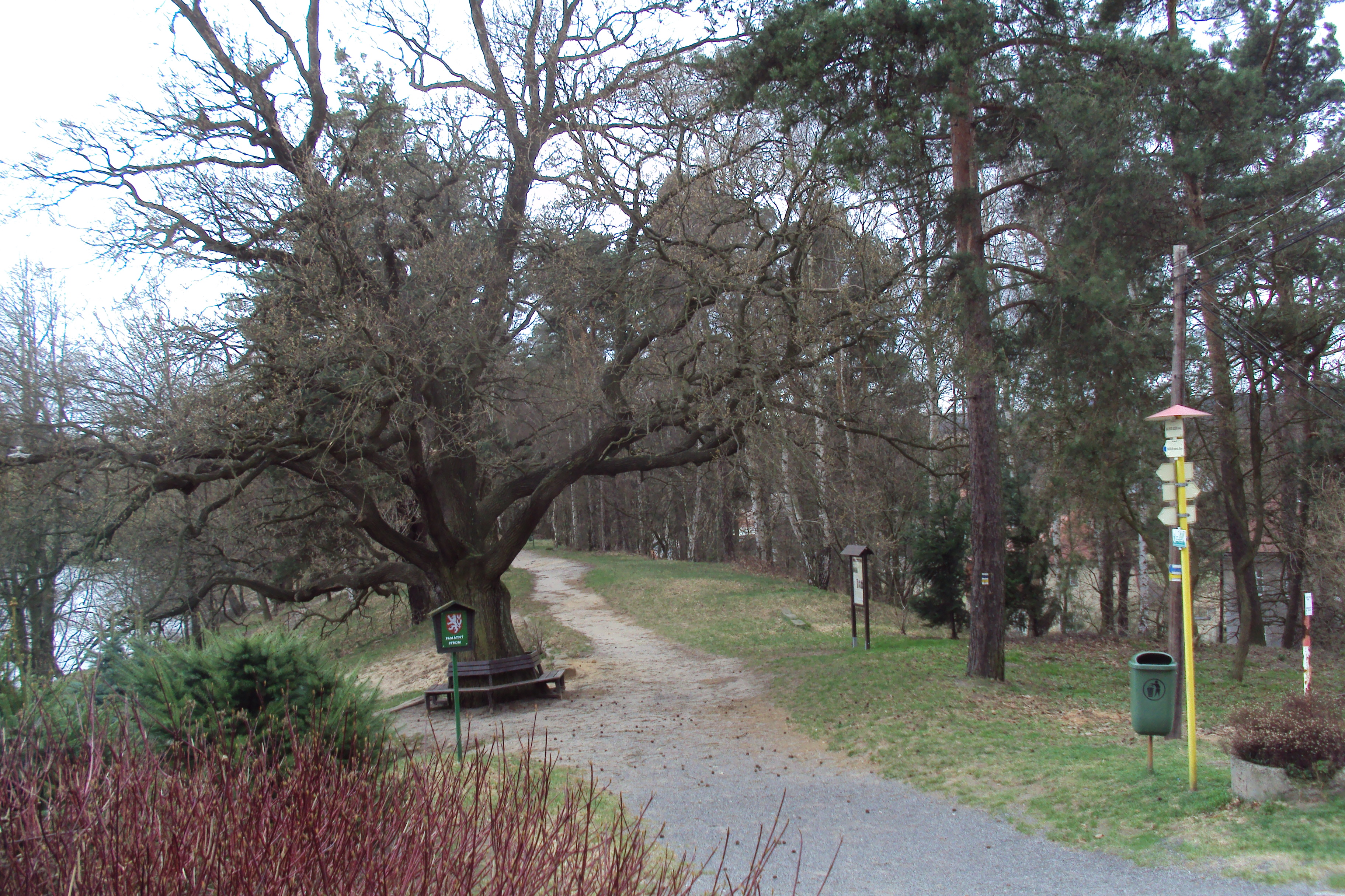 Na hrázi Máchova jezera pod Šroubeným památný strom č.102163 - dub letní